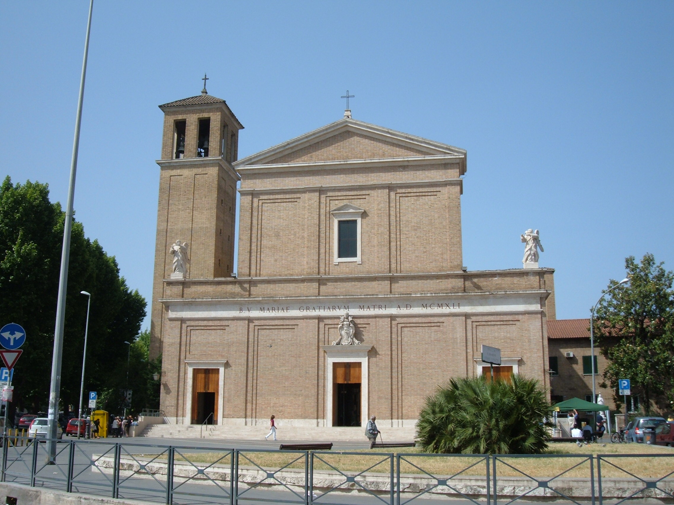 Chiesa di Santa Maria delle Grazie al Trionfale.